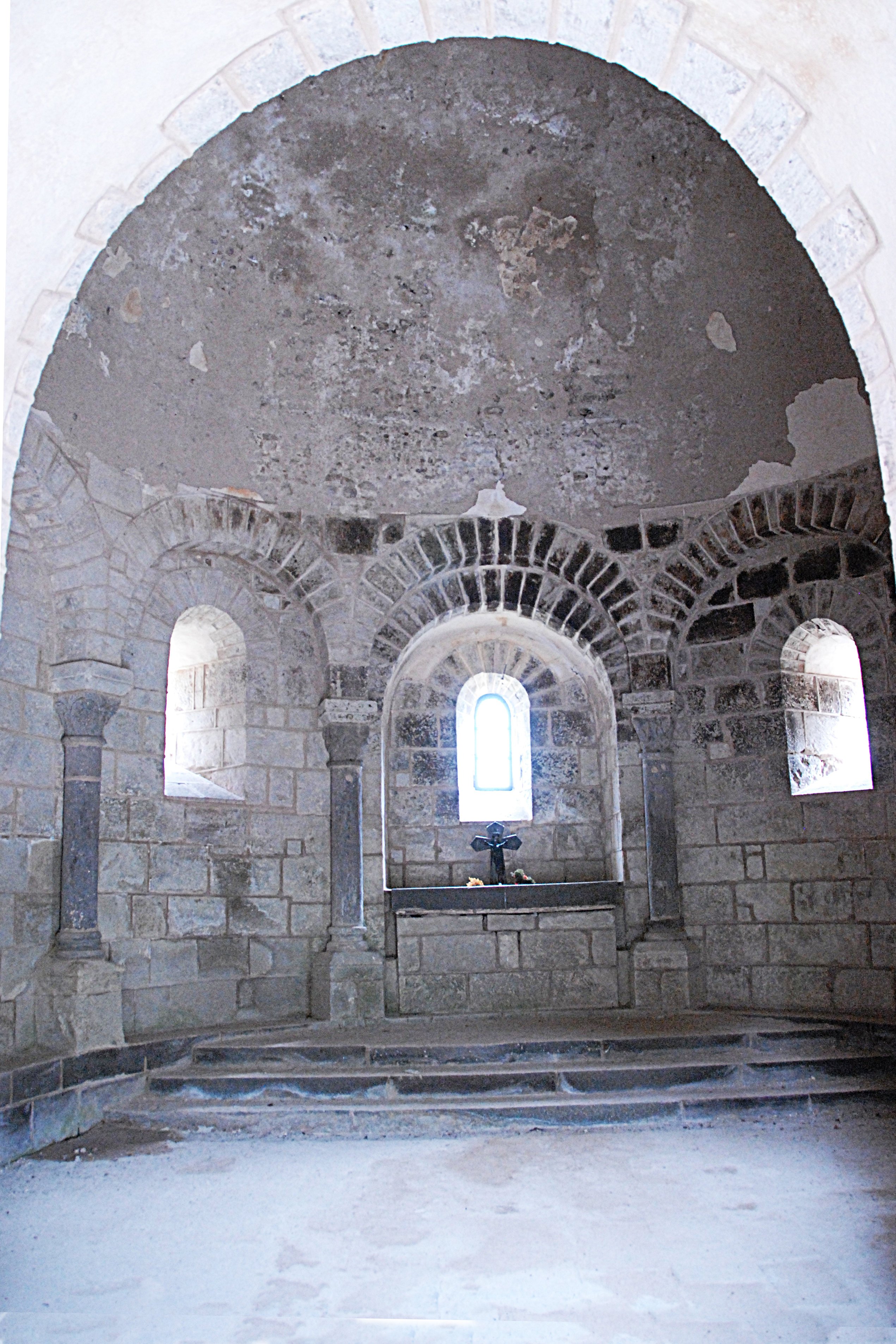 Chambon-sur-Lac, Friedhofskapelle, Inneres aus Narthex